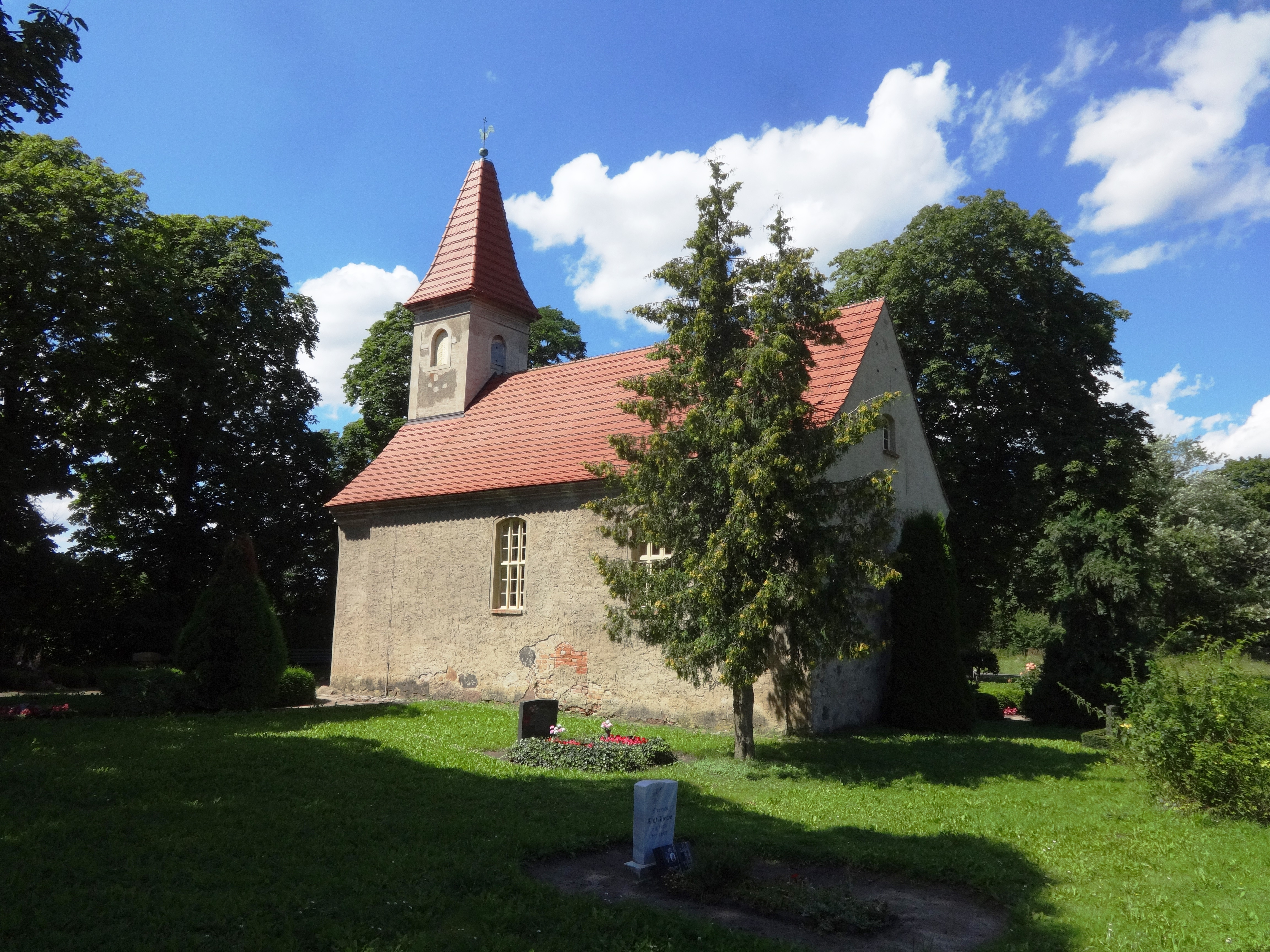 Die Kapelle Busow der Gemeinde Ducherow wurde im 15. Jahrhundert aus Feldsteinen errichtet und anschließend verputzt. Im Innenraum steht unter anderem ein Kanzelaltar aus dem Ende des 18. Jahrhunderts.